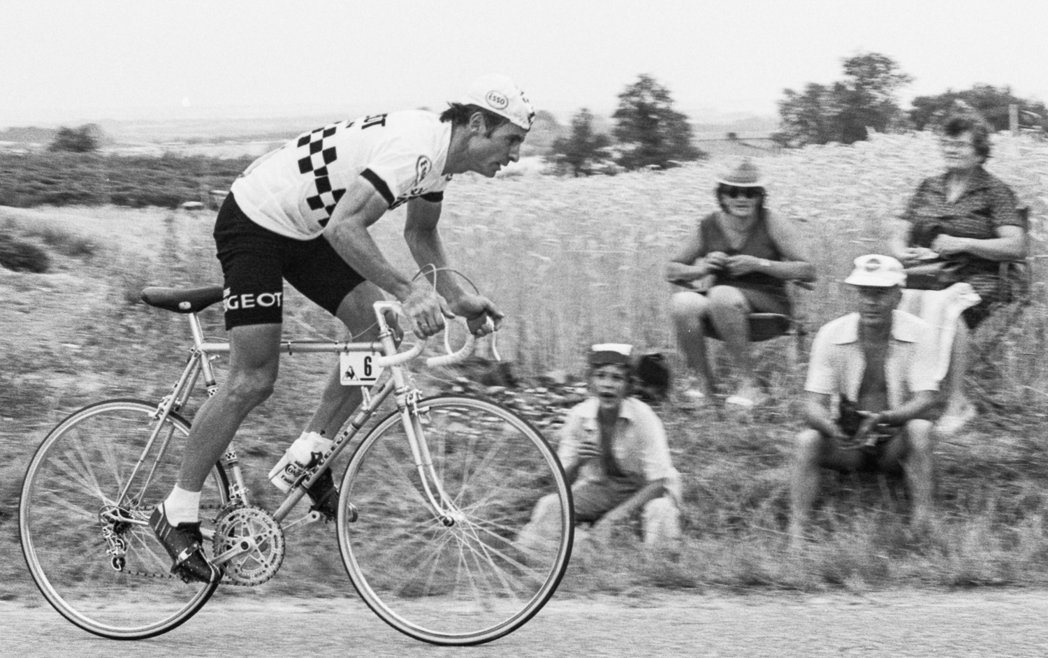 Jacques Esclassan durant le Tour de France 1976. Photographie : René Milanese